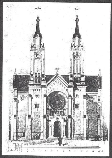 Švč. Mergelės Marijos Nekalto Prasidėjimo bažnyčios projektas (bažnyčios archyvo kopija)